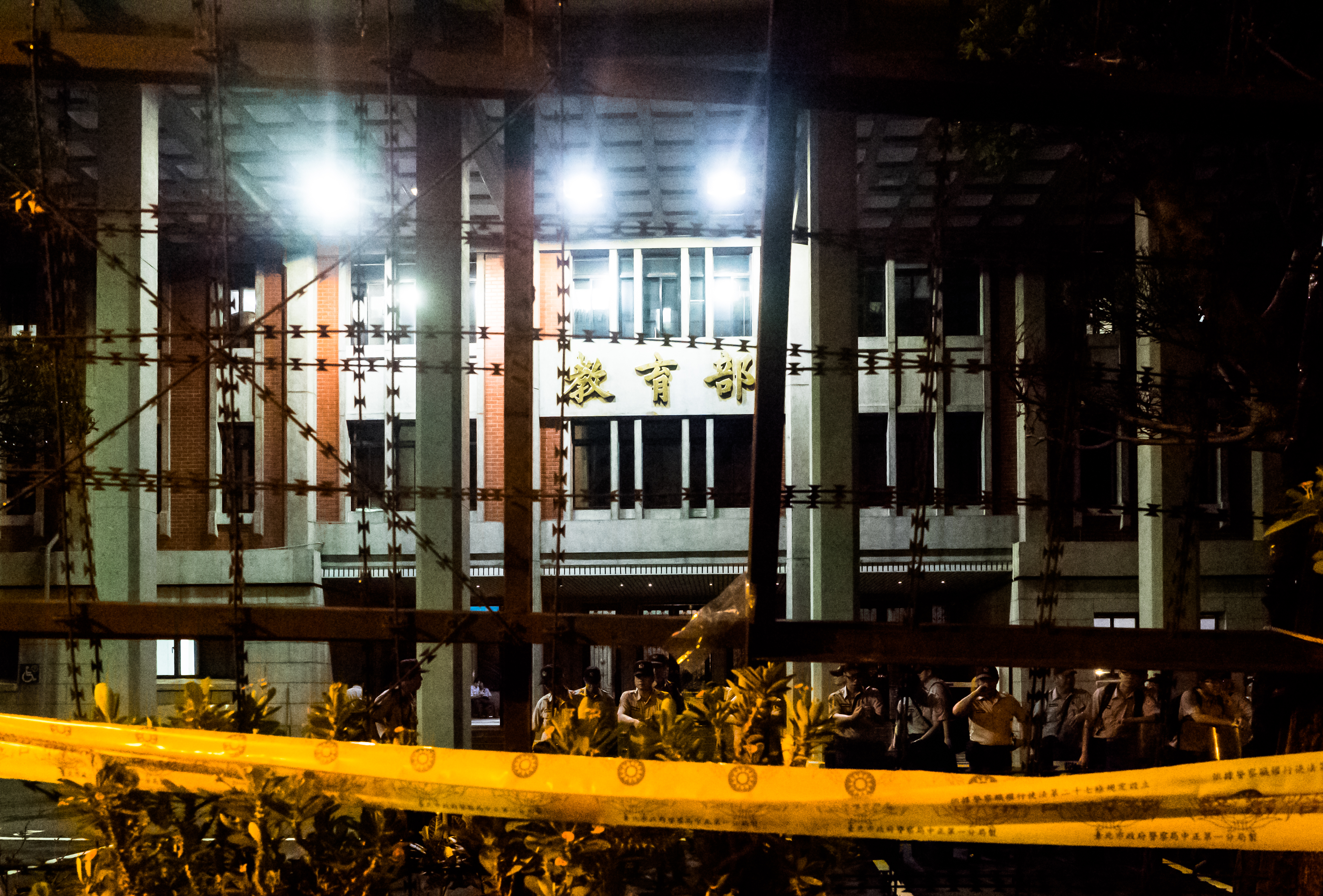 2015年7月24日，中華民國教育部一景